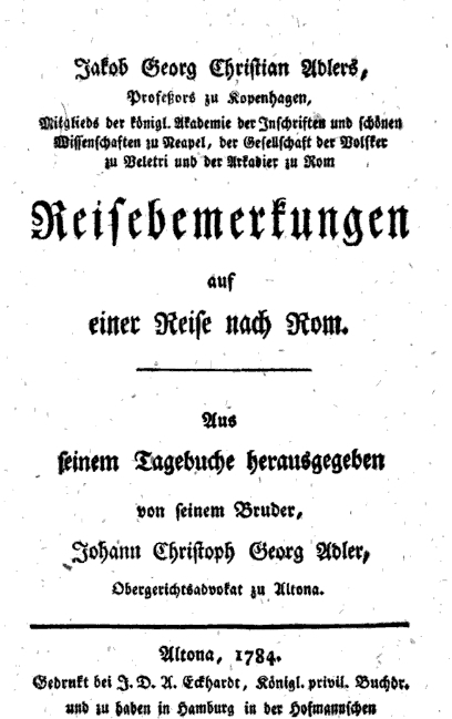 Titelblatt des Buches Reisebemerkungen auf einer Reise nach Rom von Jacob Georg Christian Adler